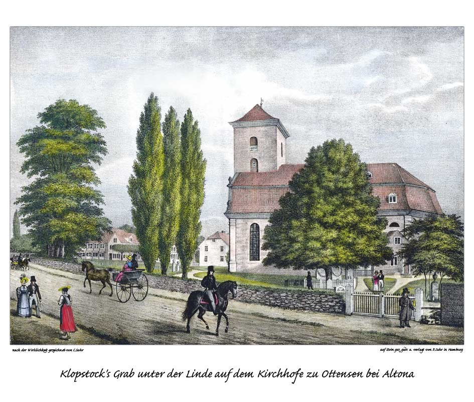 Klopstocks Grab auf dem Kirchhofe zu Ottensen bei Altona, gezeichnet von Christoffer Suhr, Litho von Peter Suhr